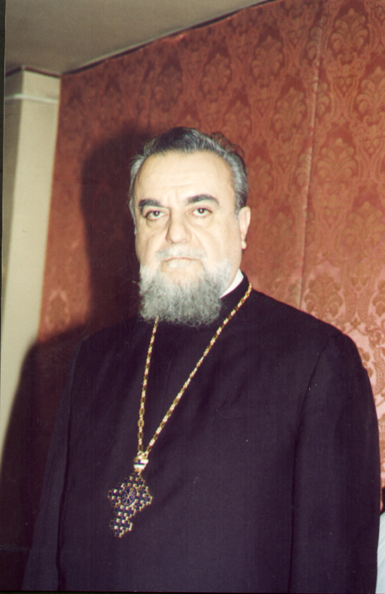 la foto del'Archimandrita Mitroforo Dottor Zareh Baronian